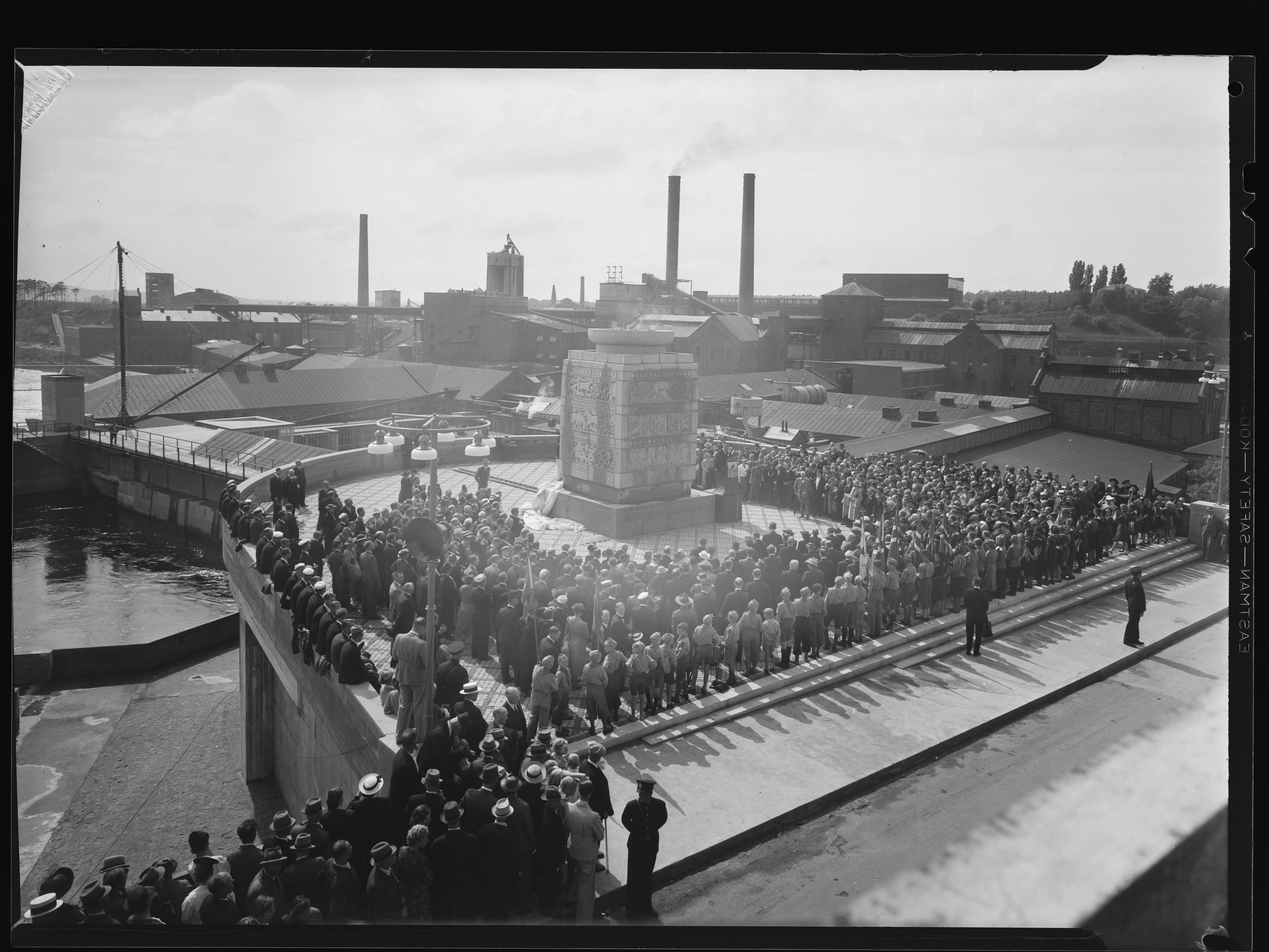 Bildet er hentet fra Nasjonalbibliotekets bildesamling. Anmerkninger til bildet var: Fotograf ukjent. Sarpsborg, Sarpsborg, Østfold